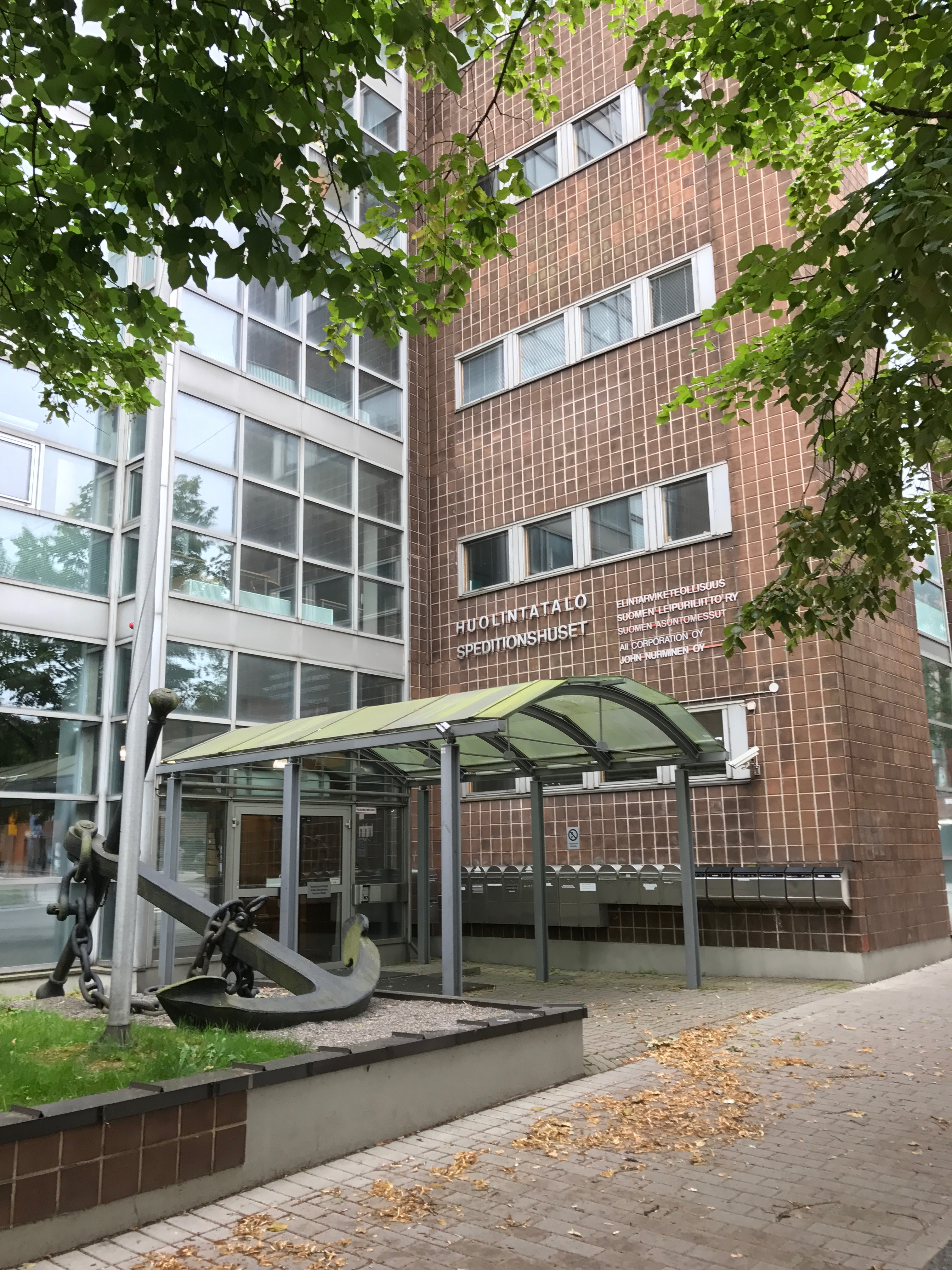 Huolintatalo on vuonna 1982 valmistunut toimistorakennus Helsingin Länsi-Pasilassa.